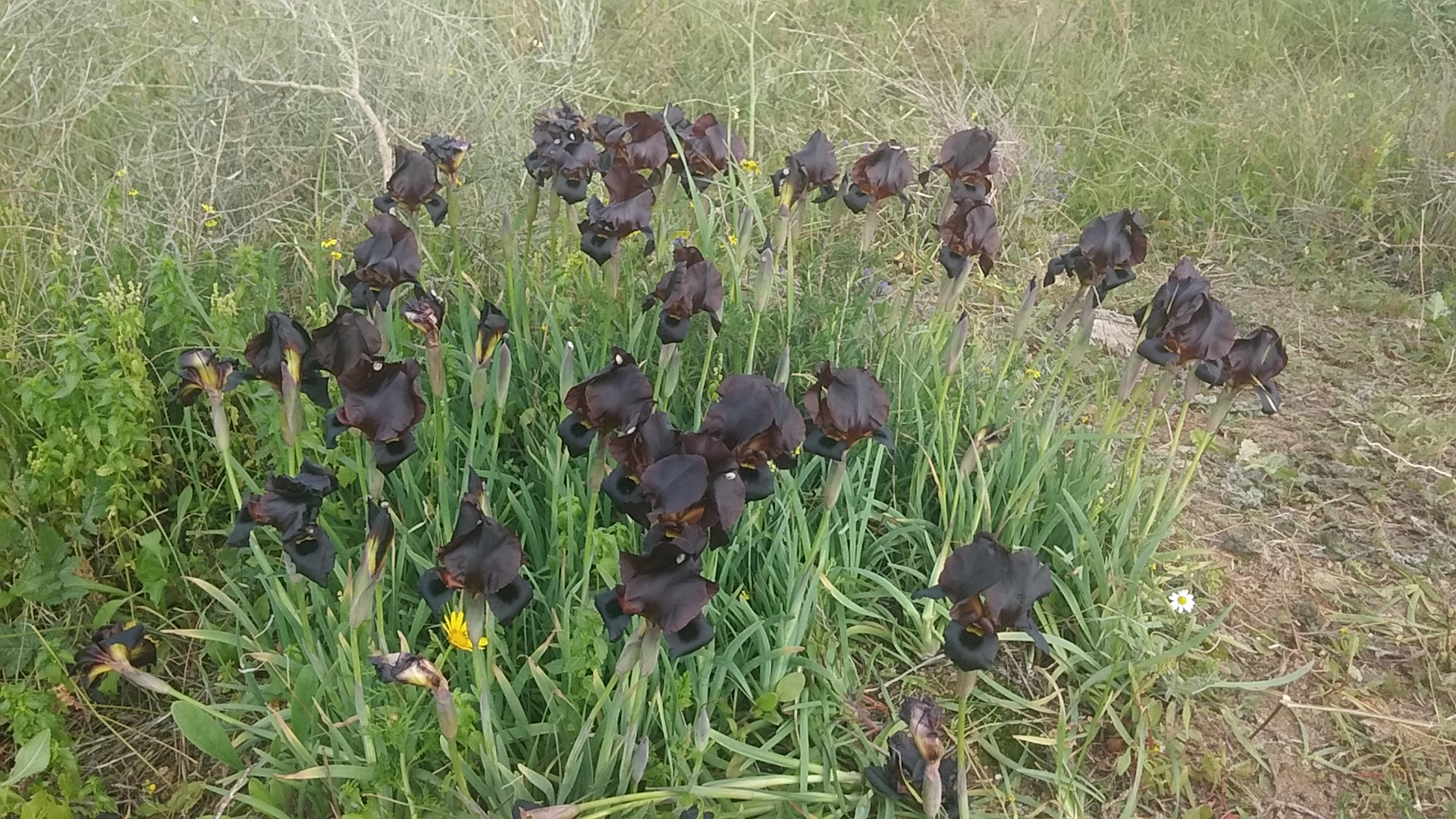 פריחת חורף במישור החוף, אירוס הארגמן Iris